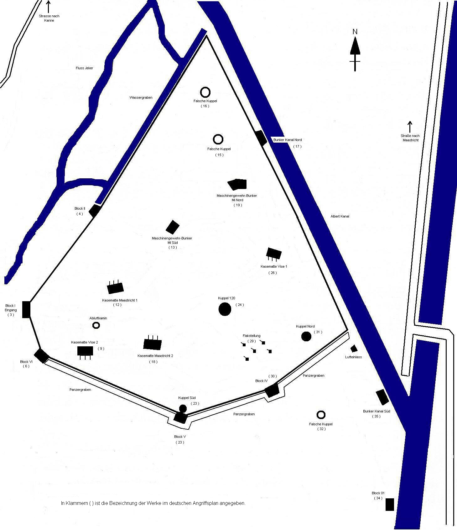 Fort Eben Emael - Schematische Darstellung der Festungswerke